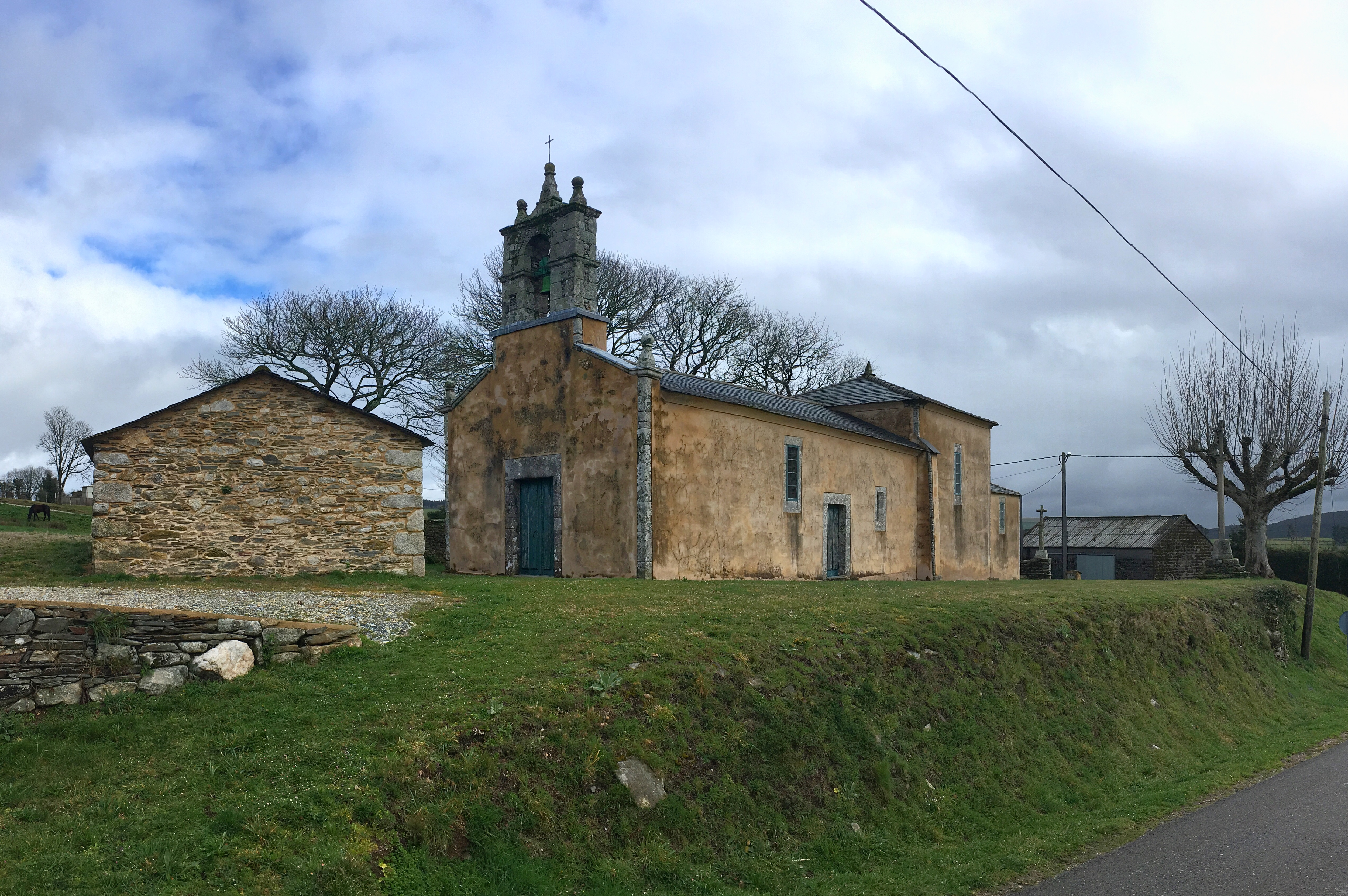 Igrexa e atrio da parroquia de Fanoi, Abadín.